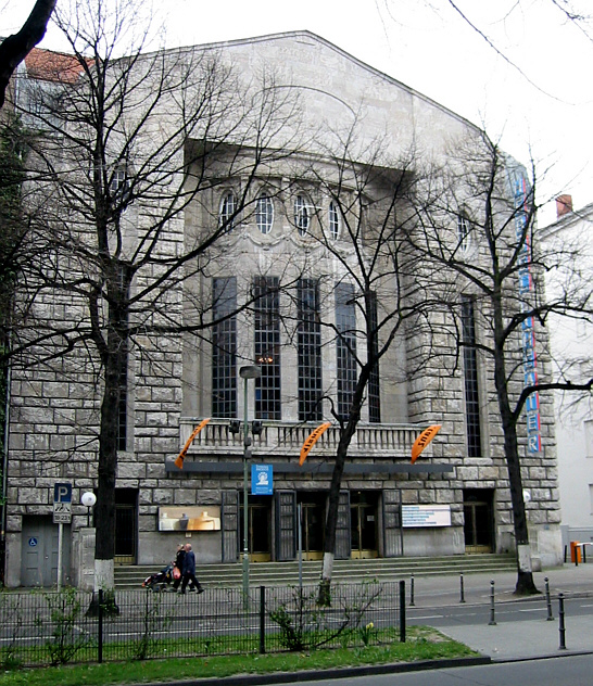 Berlin, Kreuzberg: Hebbeltheater (built by Oskar Kaufmann), Stresemannstraße 29/29a